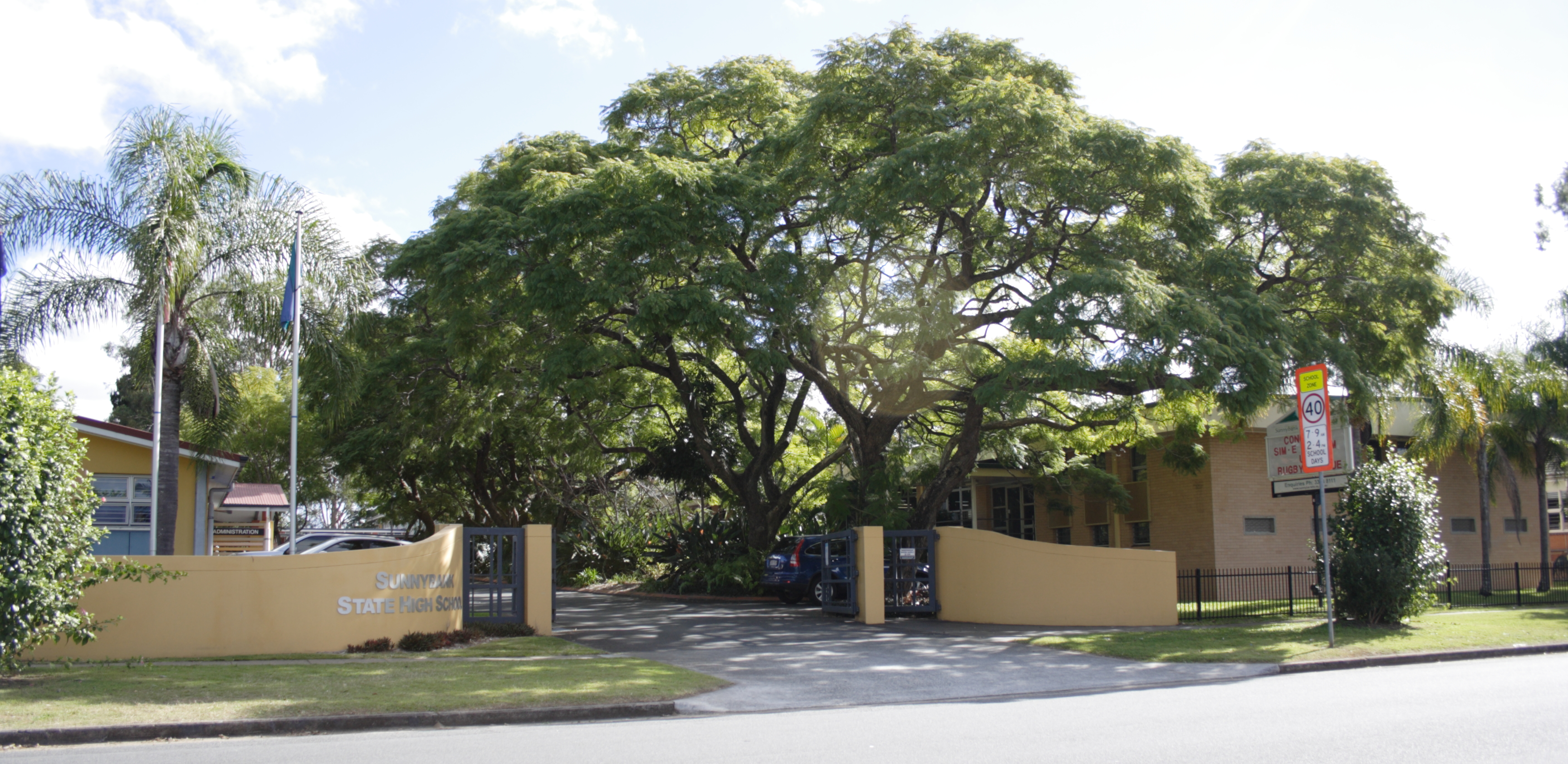 Boorman Street entrance